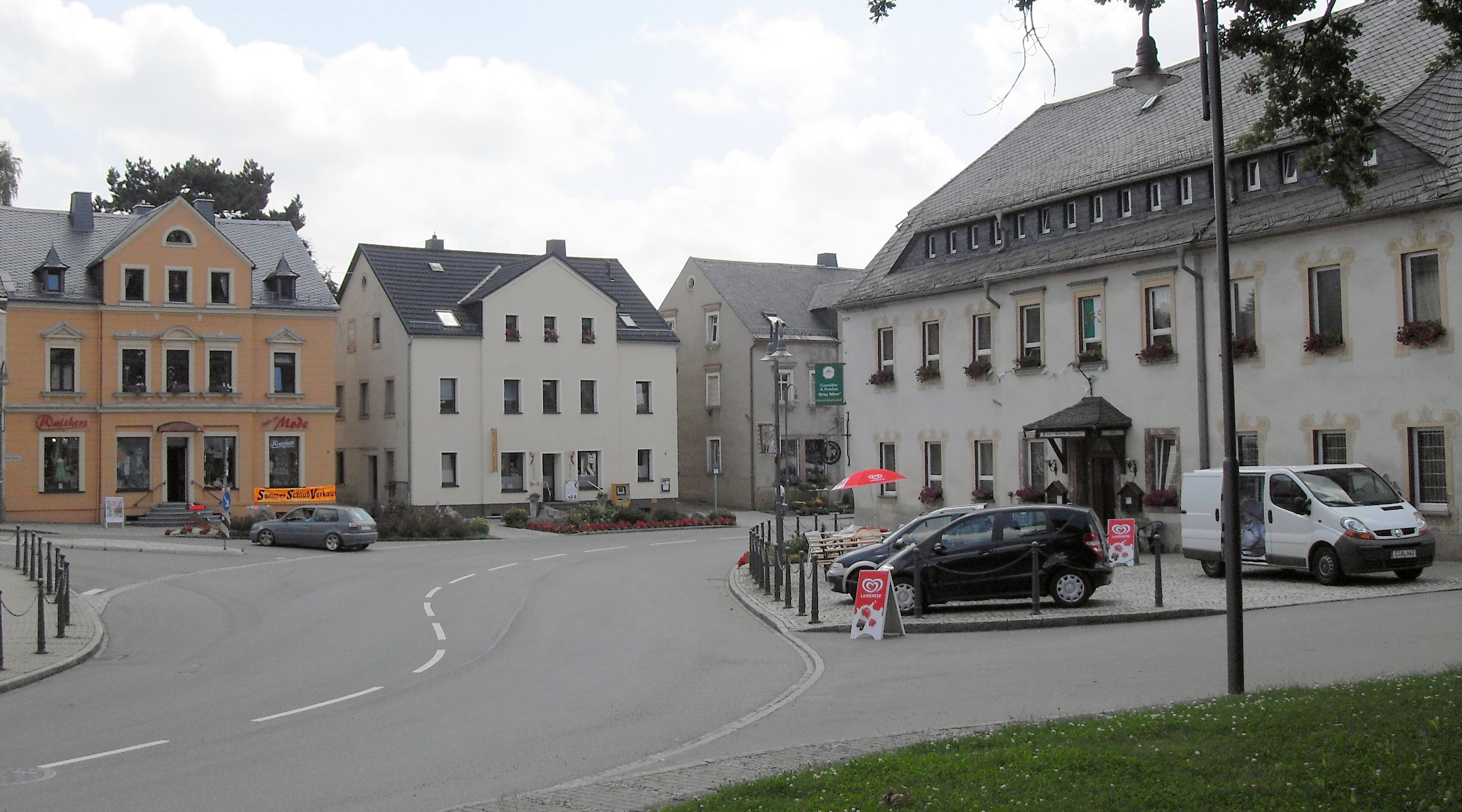 Albertplatz in Eppendorf, Landkreis Mittelsachsen